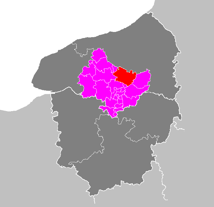 Maps of arrondissements and cantons of France: Arrondissement de Rouen - Canton de Clères.PNG